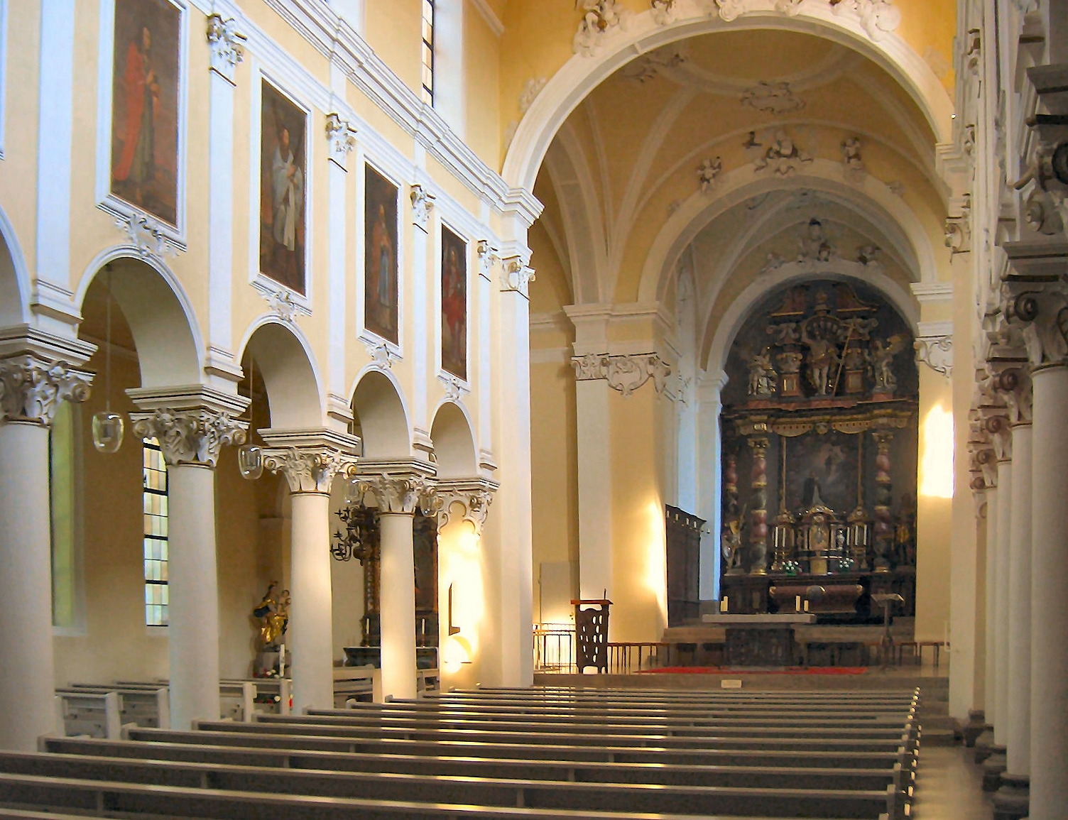 Innenraum der St.-Mauritius-Kirche (Hildesheim)